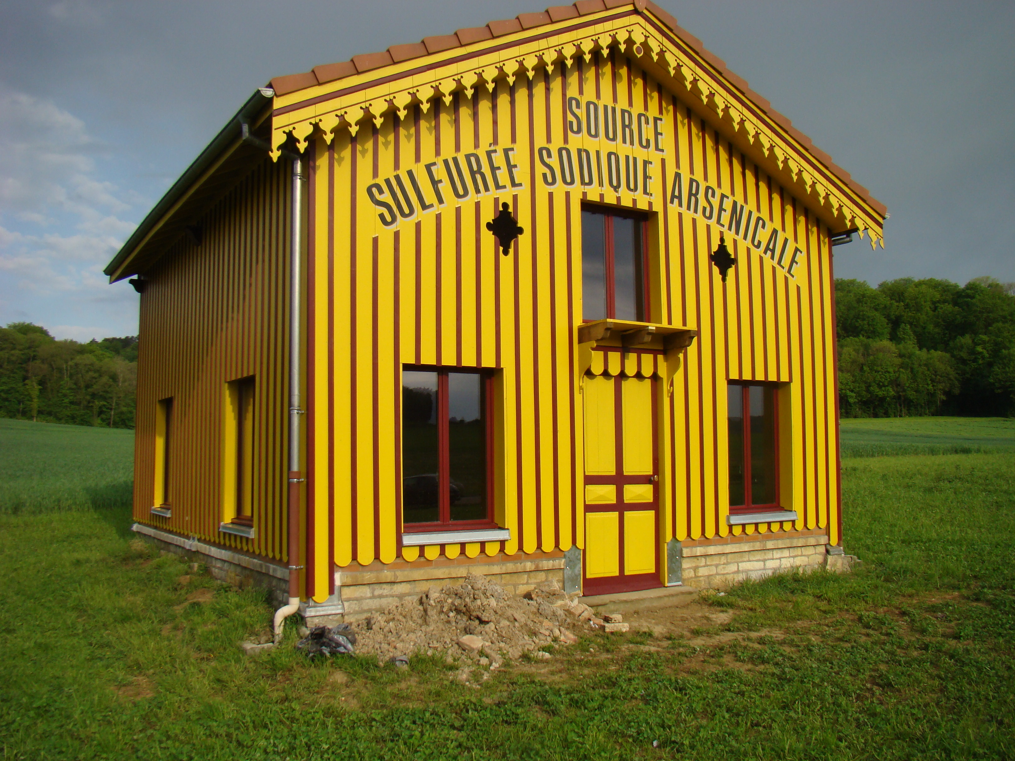 pavillon restauré de la source de Dolaincourt